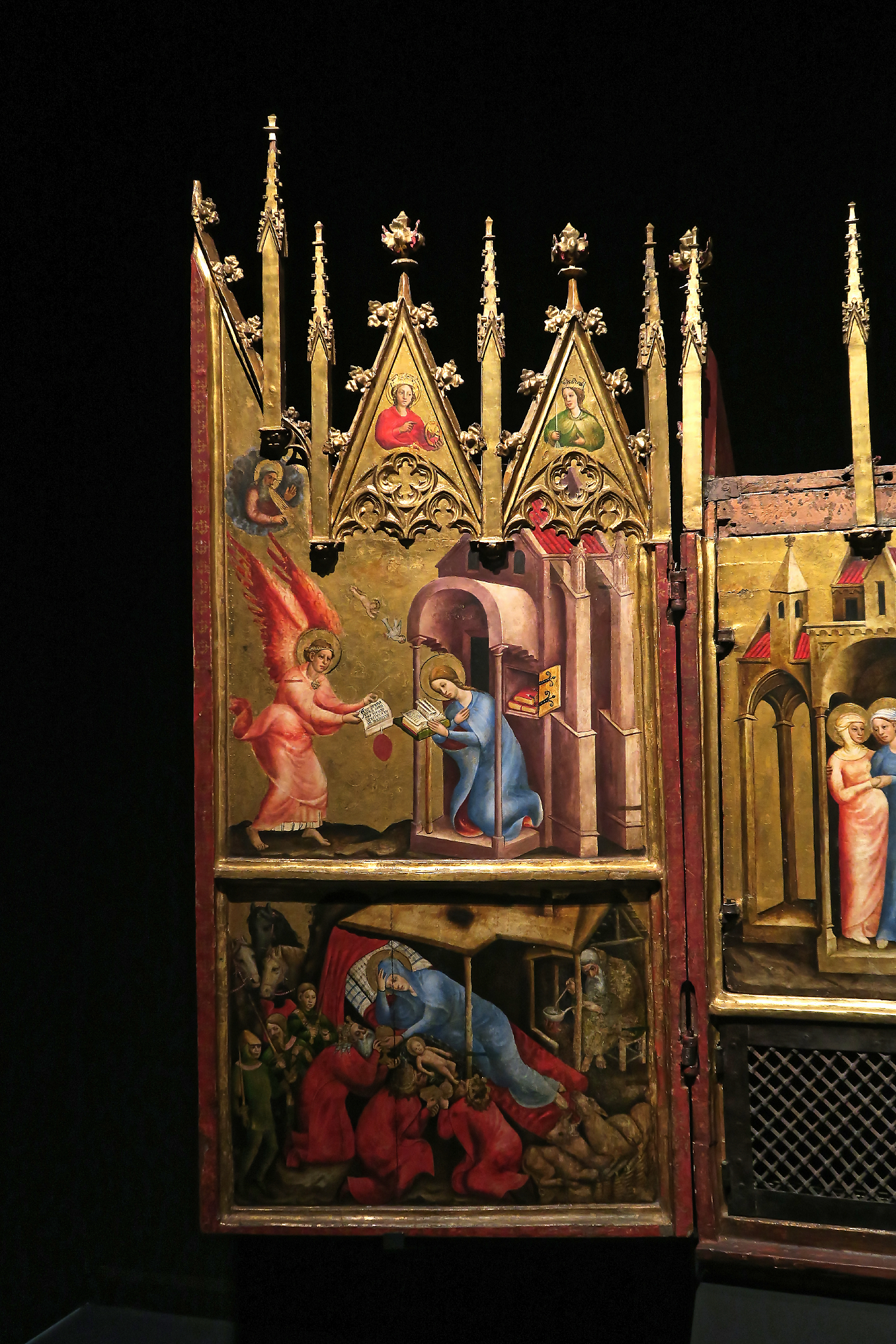 Szenen aus dem Leben Mariens, oben links Mariä Verkündigung